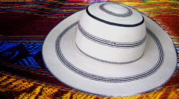 Sombrero Pintado común